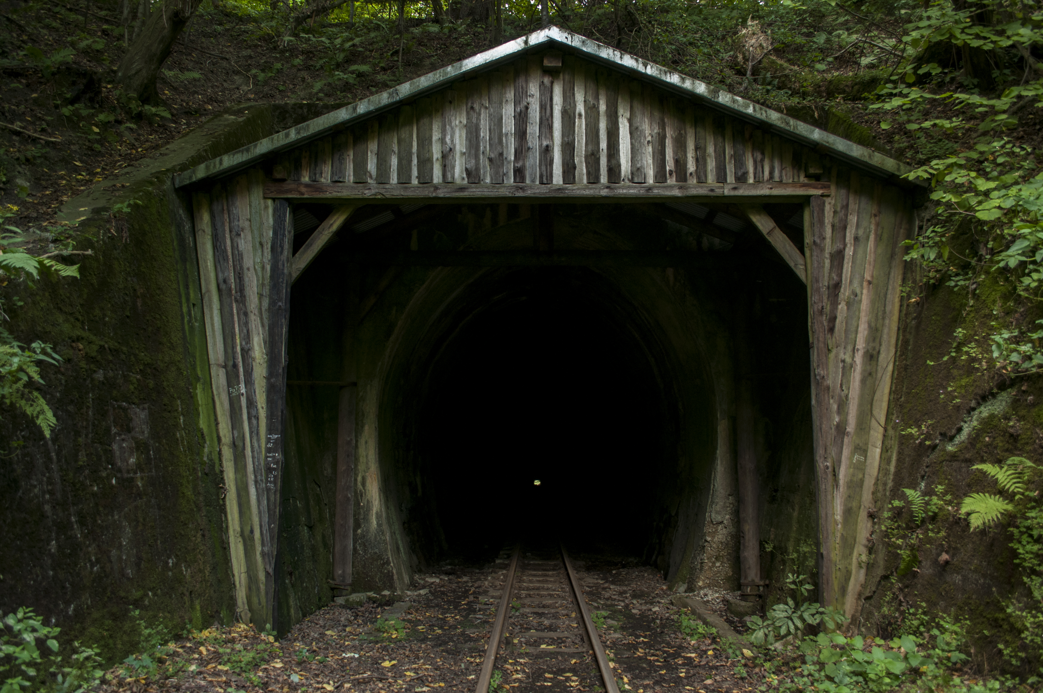 Szklary, tunel (pod stacją Szklary), 1890-1904 (w zespole kolejki wąskotorowej Przeworsk-Dynów)